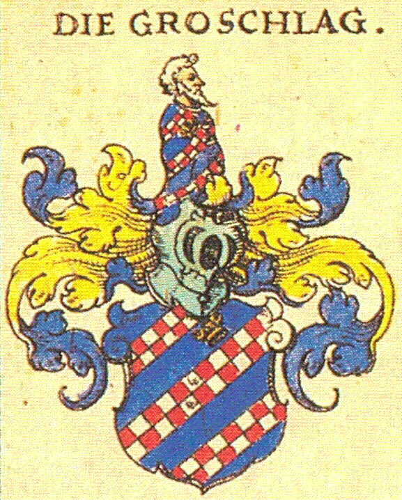 Wappen der Familie von Groschlag nach Siebmachers Wappenbuch